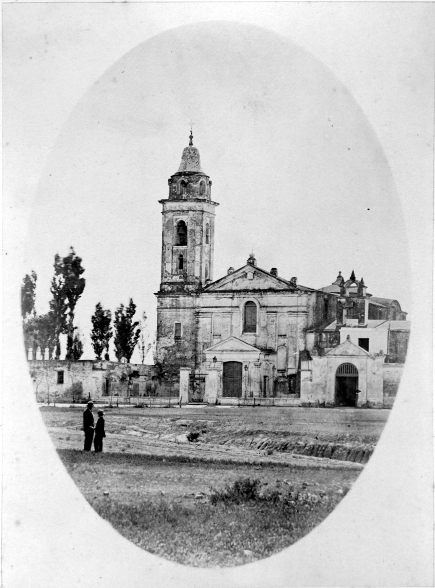 Fachada asimétrica de la Iglesia de Nuestra Señora del Pilar, en primer plano un hombre y un niño ; a la izquierda la torre campanario y a la derecha la conocida espadaña (campanario abierto) de doble arco. Fue inaugurada el 12 de octubre de 1732 y declarada Monumento Histórico Nacional en el año 1942.